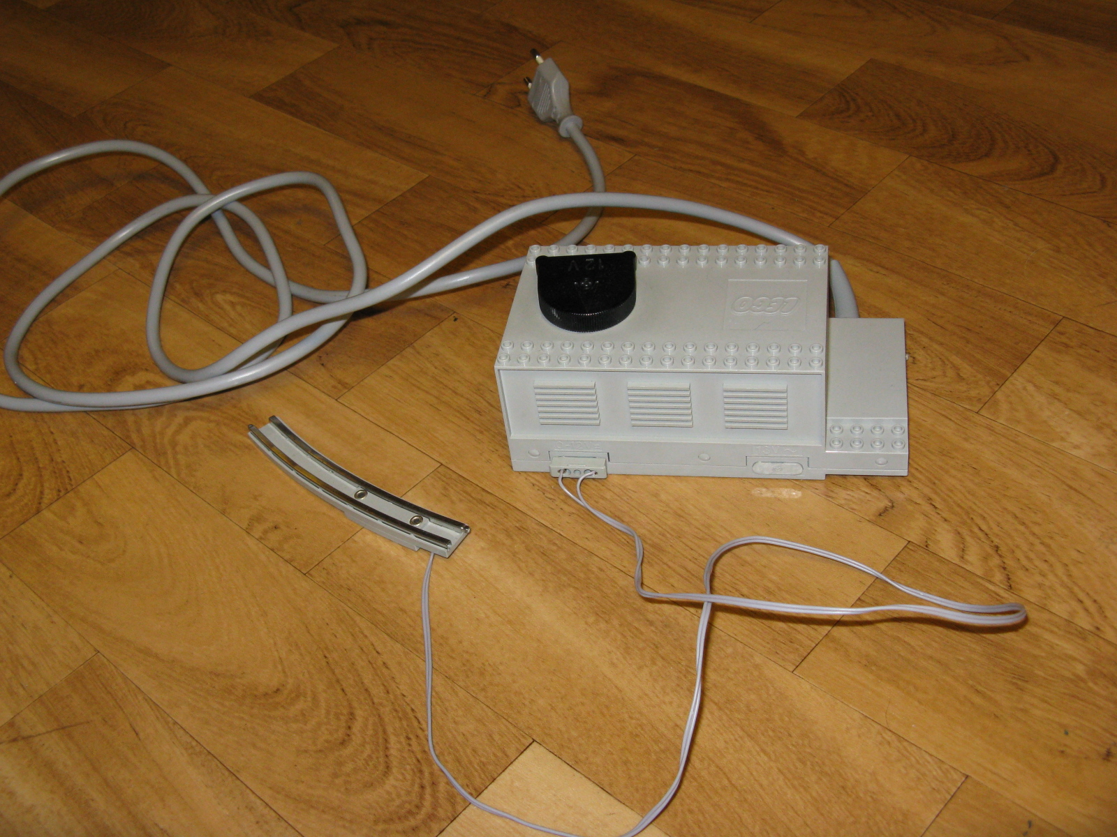 En standard lego-transformator.